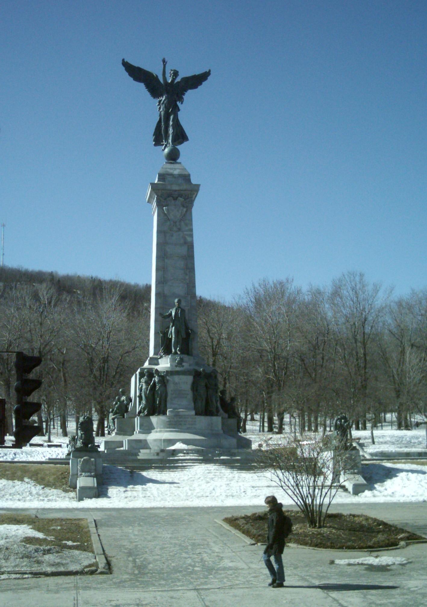 Monument à George-Étienne Cartier à l'est du Mont-Royal à Montréal, une oeuvre de George William Hill de 1919.